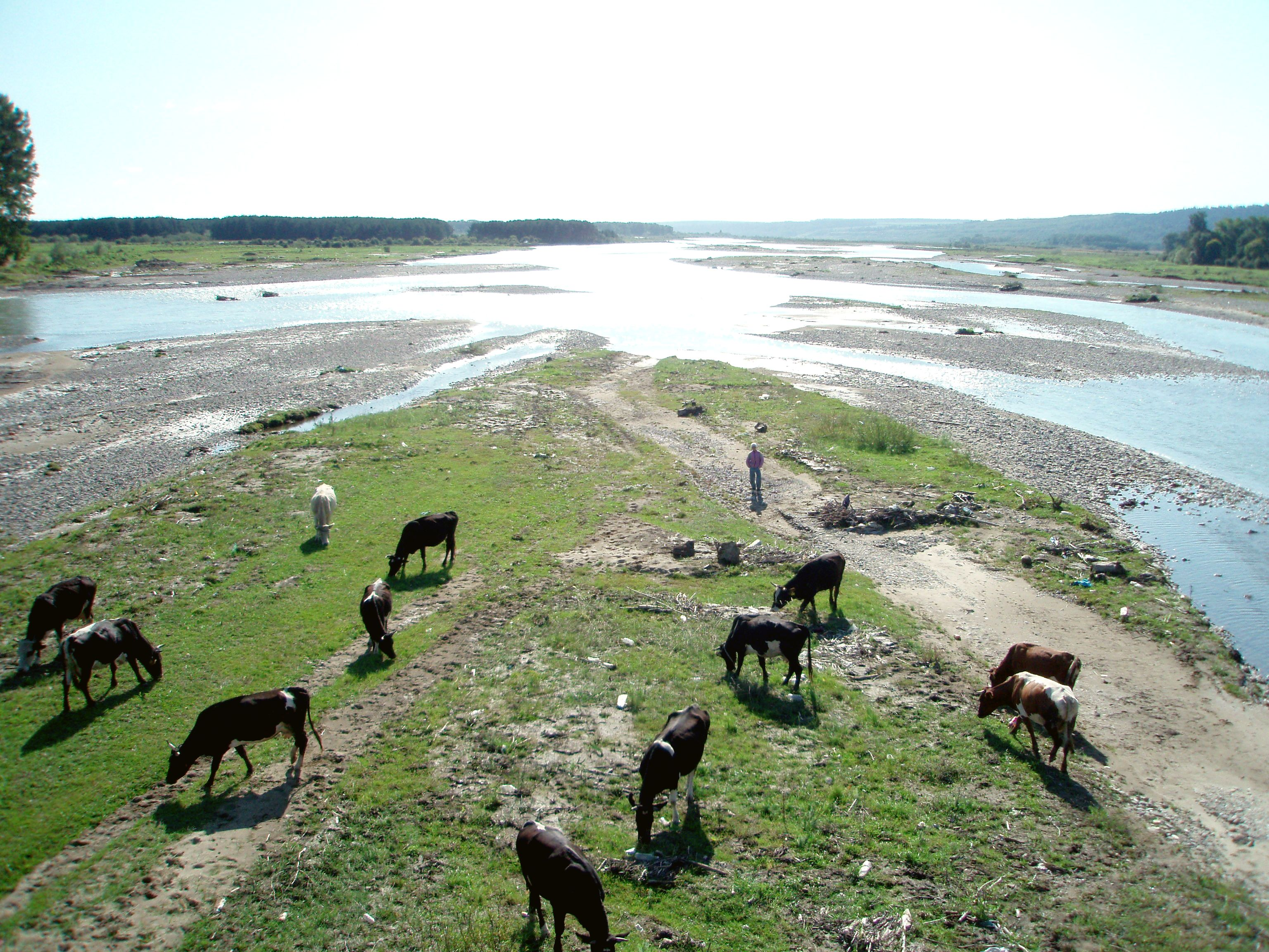 Moldova river,Romania